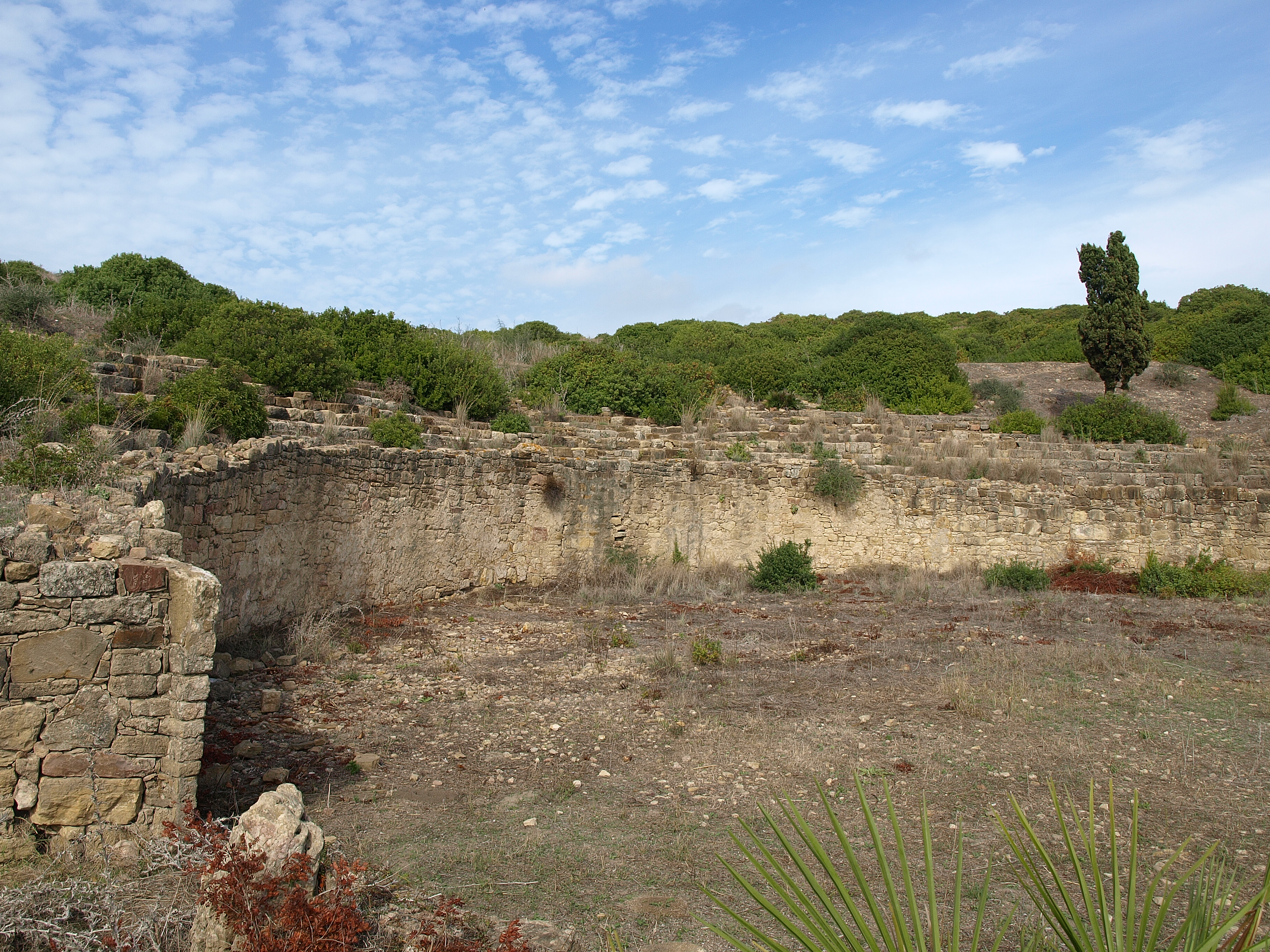 Rests of theatre